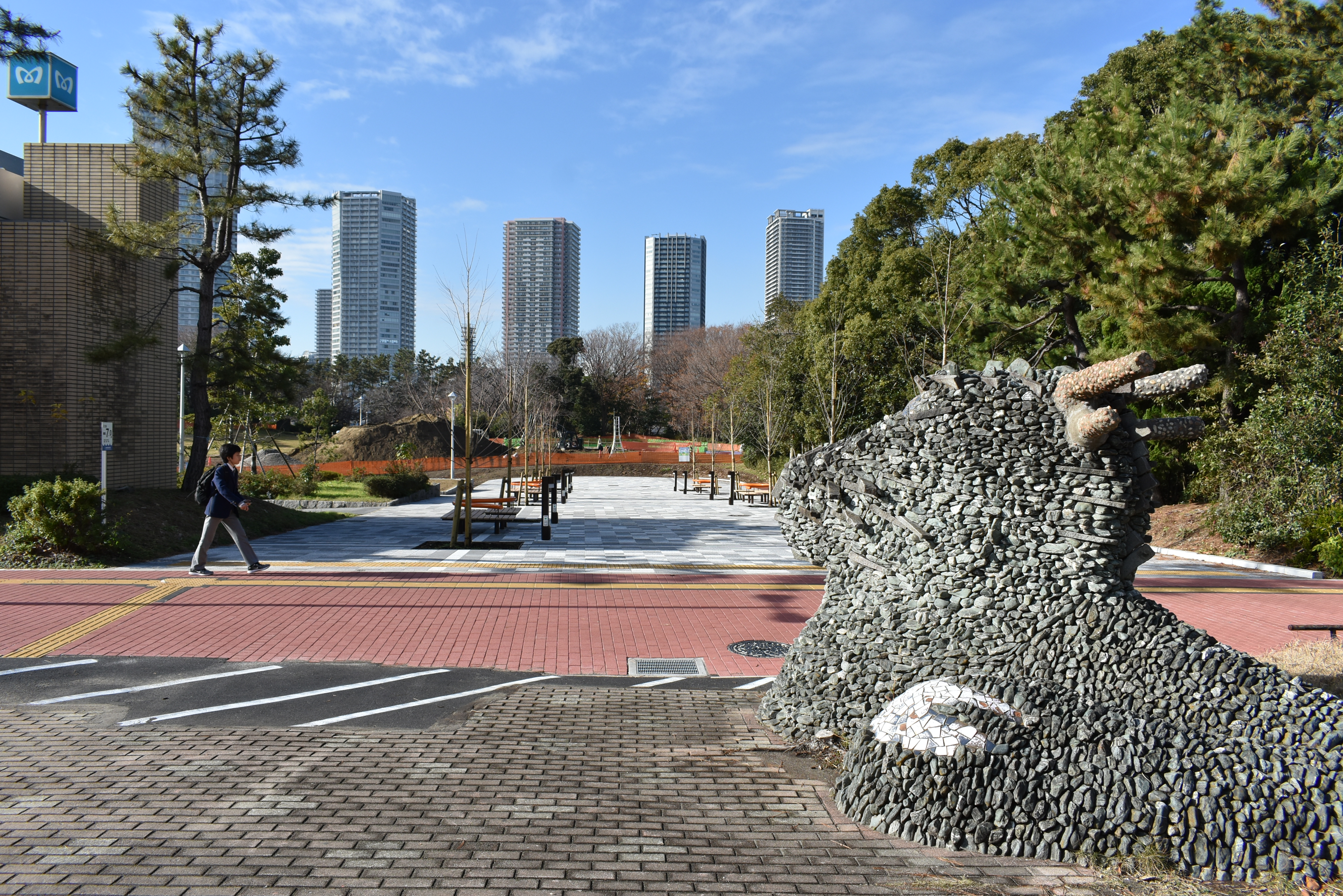 辰巳の森緑道公園